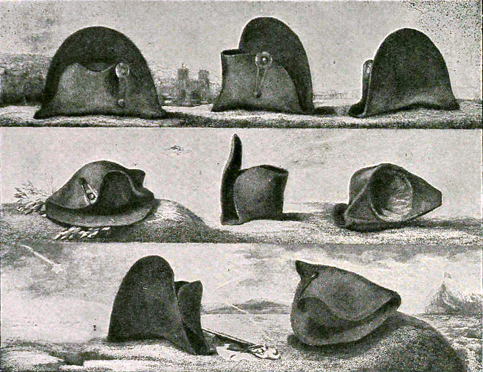 Carl Von Steuben les huit époques de Napoléon reproduction (1826) tirée de "A life of Napoleon Bonaparte" par Ida M Tarbell, 1905